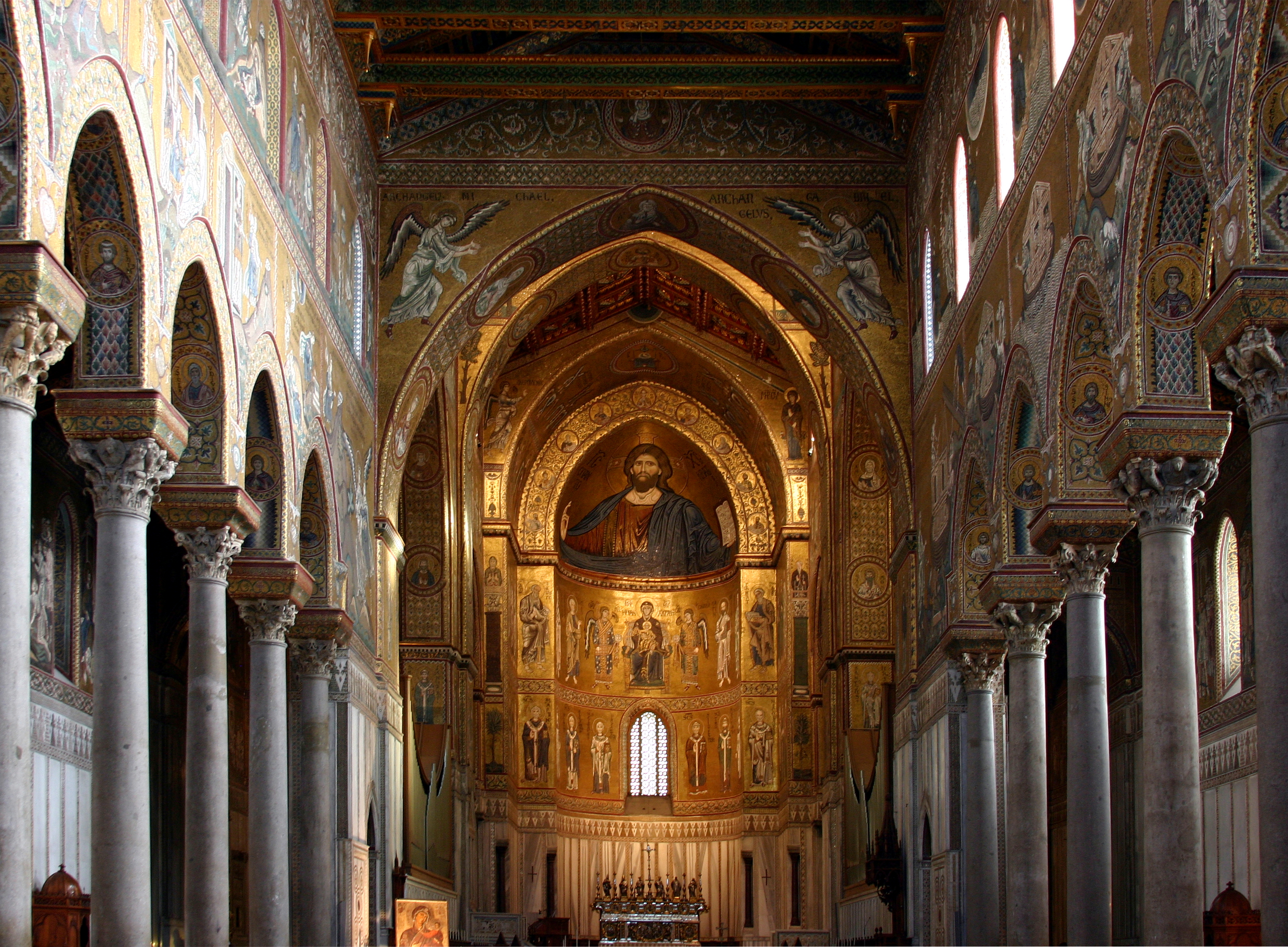 Cathedral of Monreale